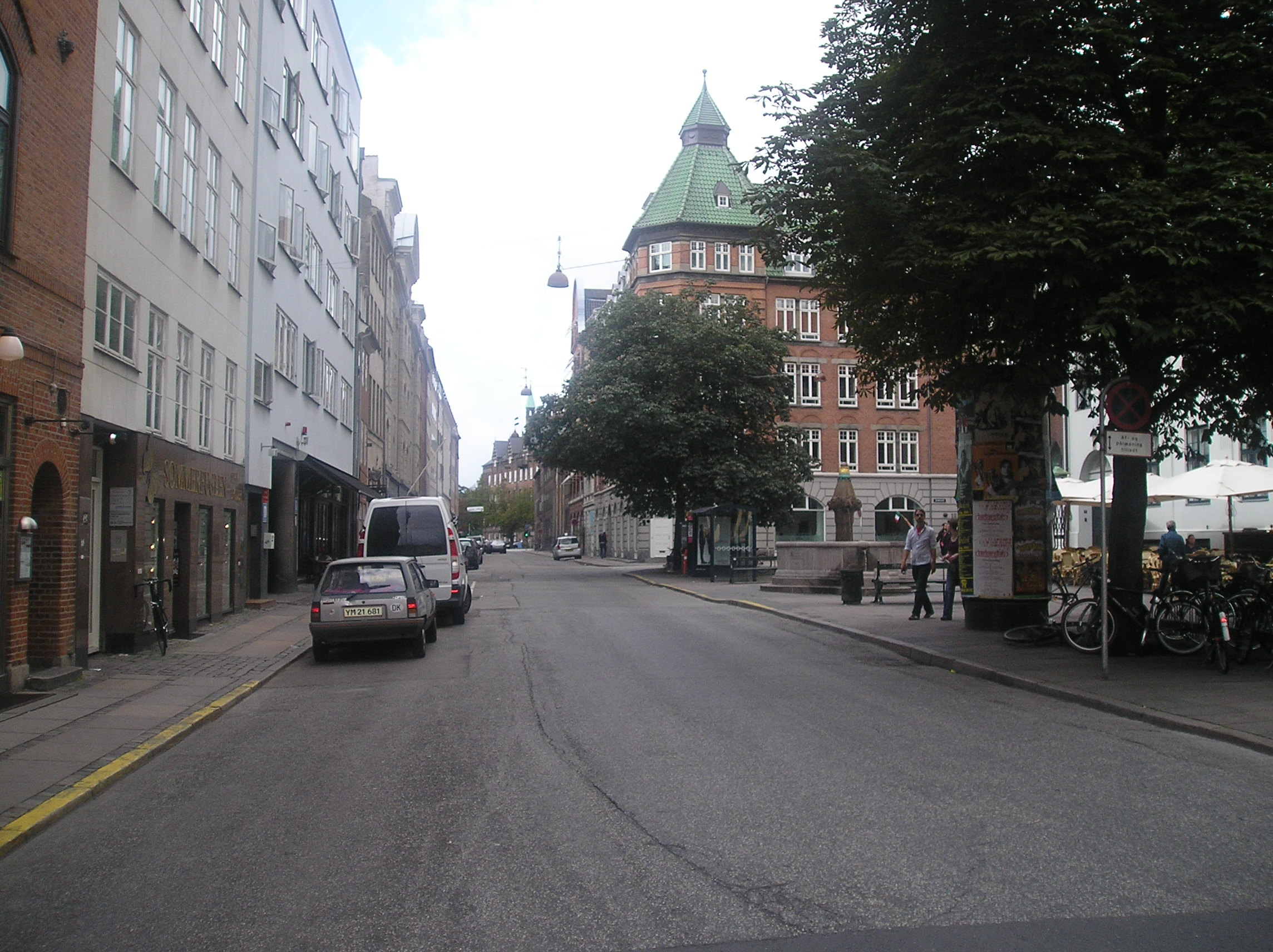 The street and square Vandkunsten in Copenhagen.